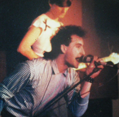 Hilario Cortell con Esgrima en la sala madrileña Rock-Ola. 1983.